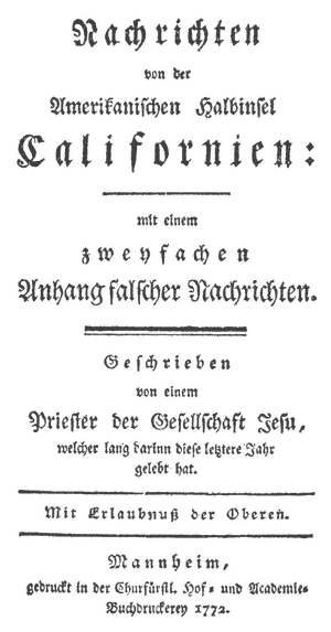 Pater Jakob Baegert S.J. Buchtitelblatt